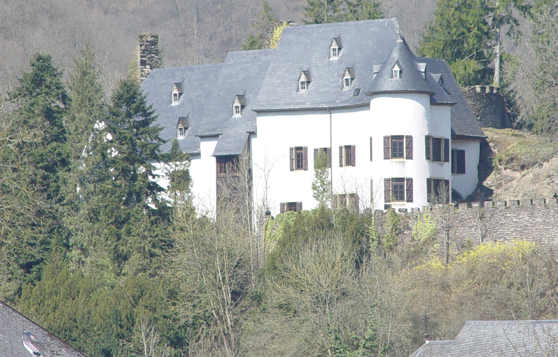 Schloss Stolzemburg